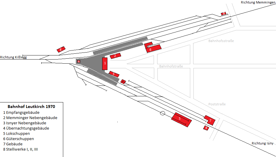 Gleisplan des Bahnhofs Leutkirch aus dem Jahr 1971